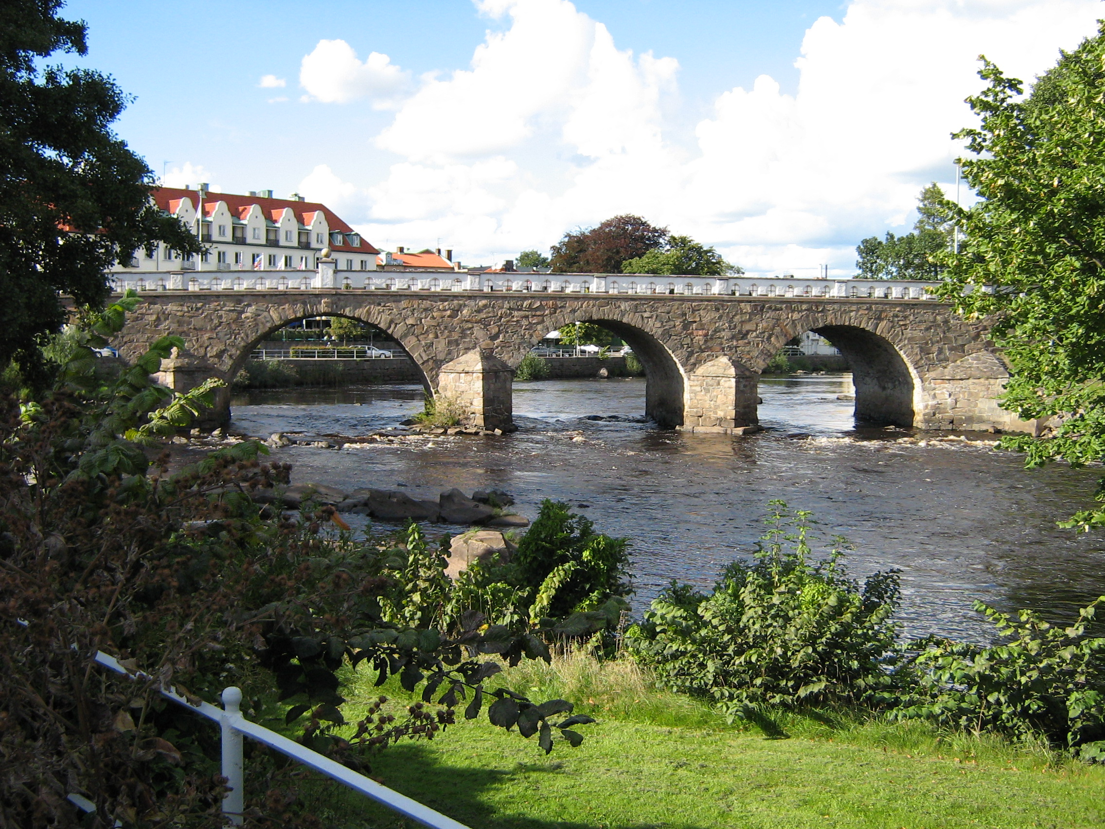 Tullbron, Falkenberg, Sverige.